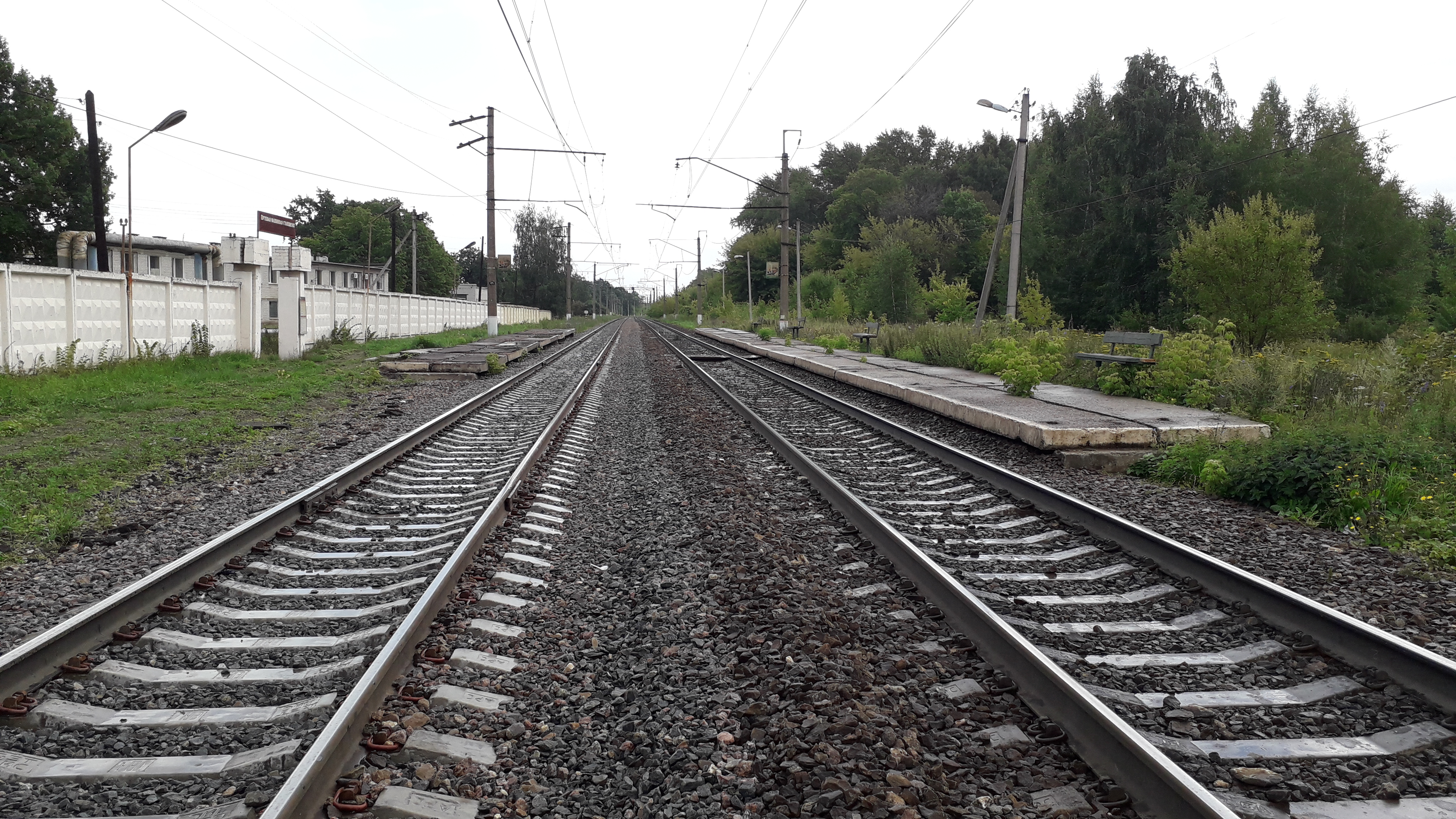 пл. 189 км (Рязанская обл.)